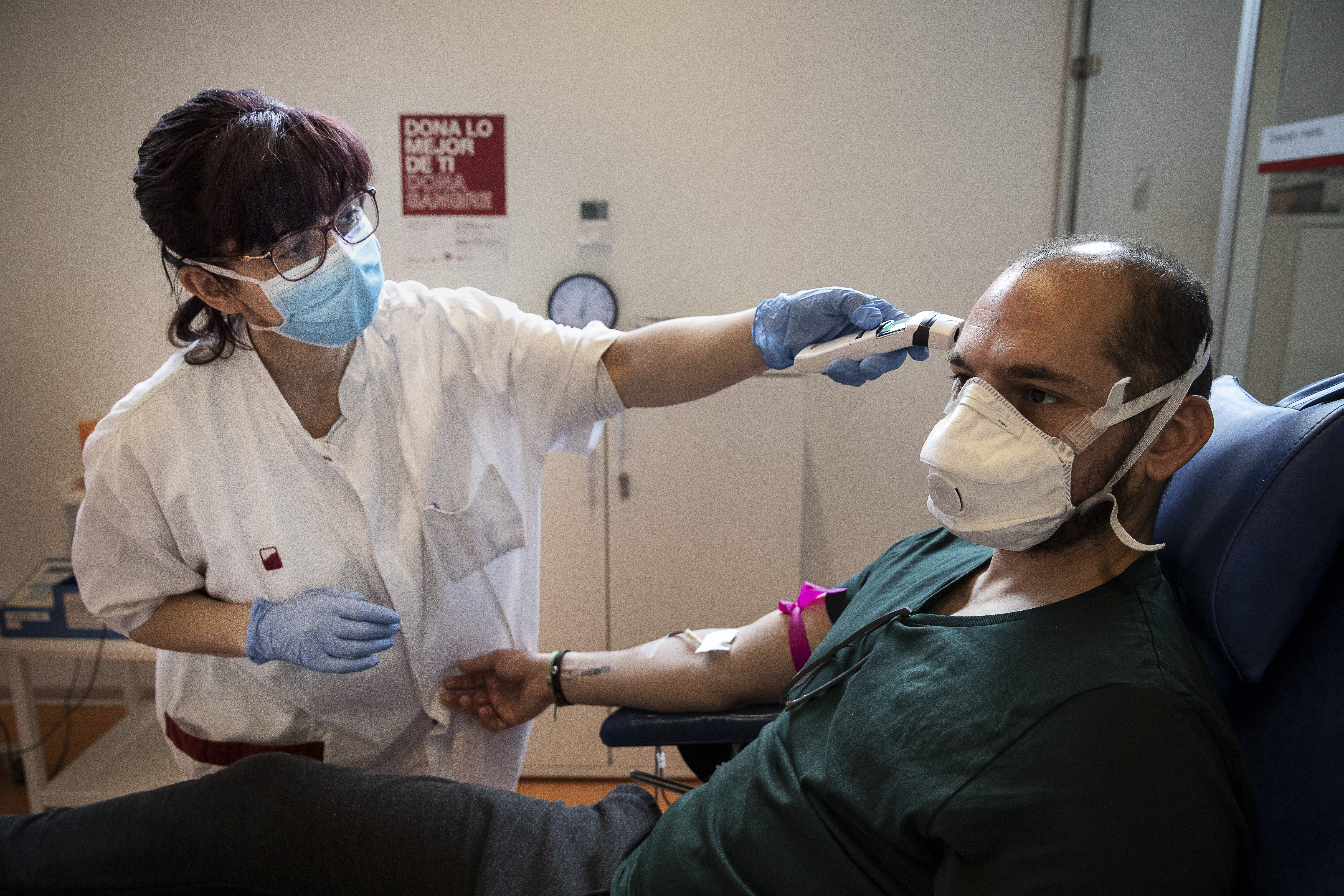 24.03.2020, Barcelona Coronavirus Covid-19 crisis. Banc de Sang de l'Hospital de Sant Pau. foto: Jordi Play